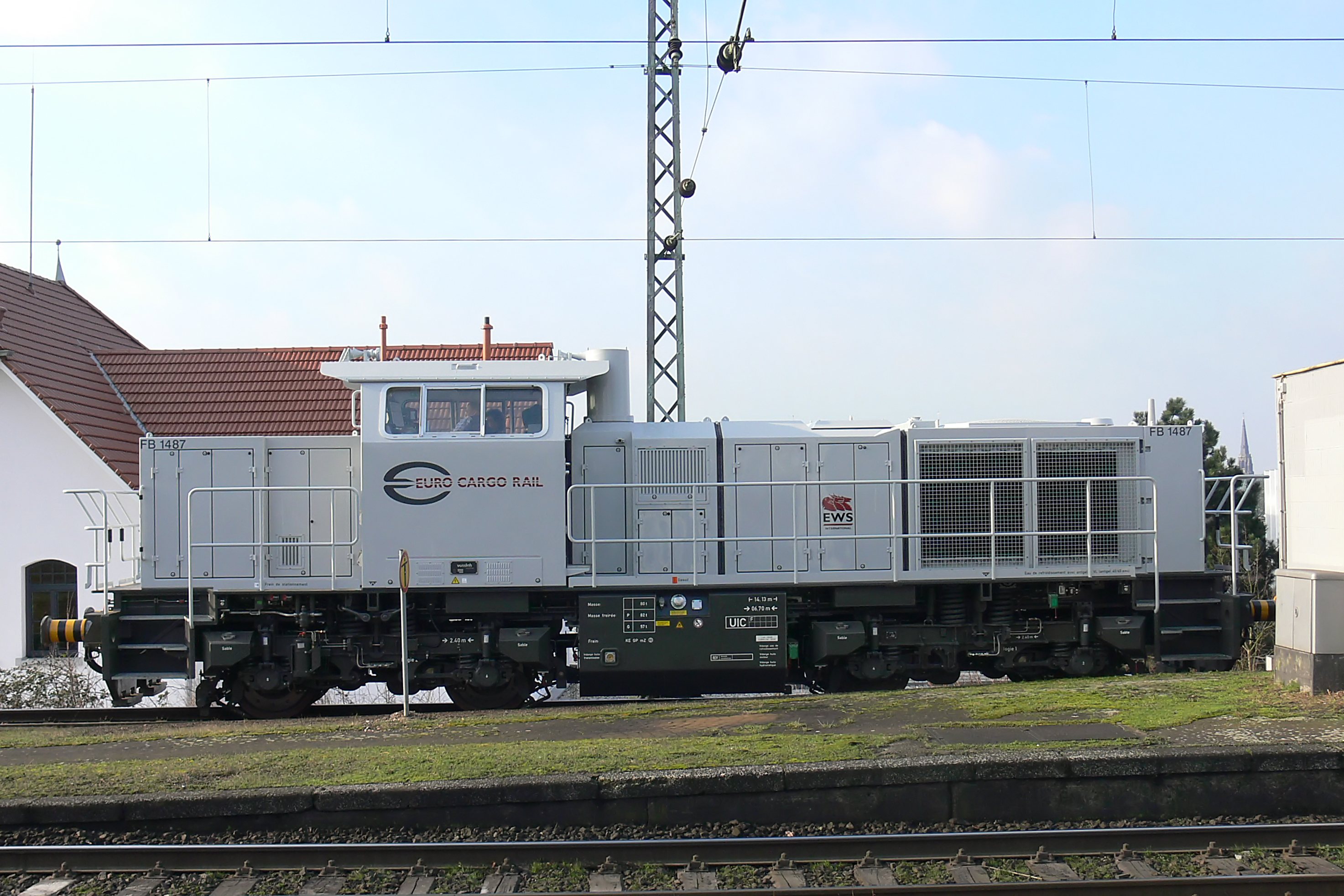 ECR FB1487 (Vossloh G1000 BB) in Moers